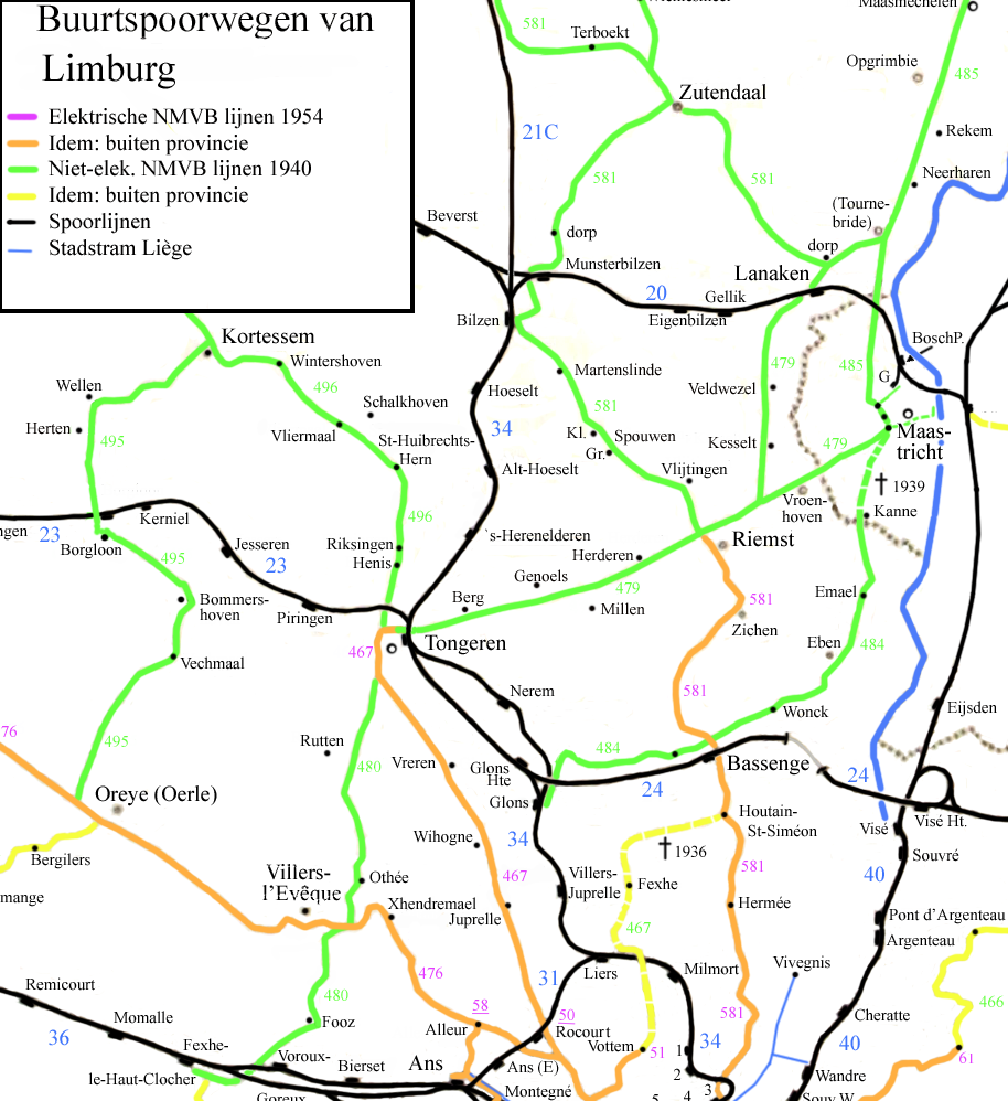 Detail van de spoor- en tramlijnen in Zuid-Limburg